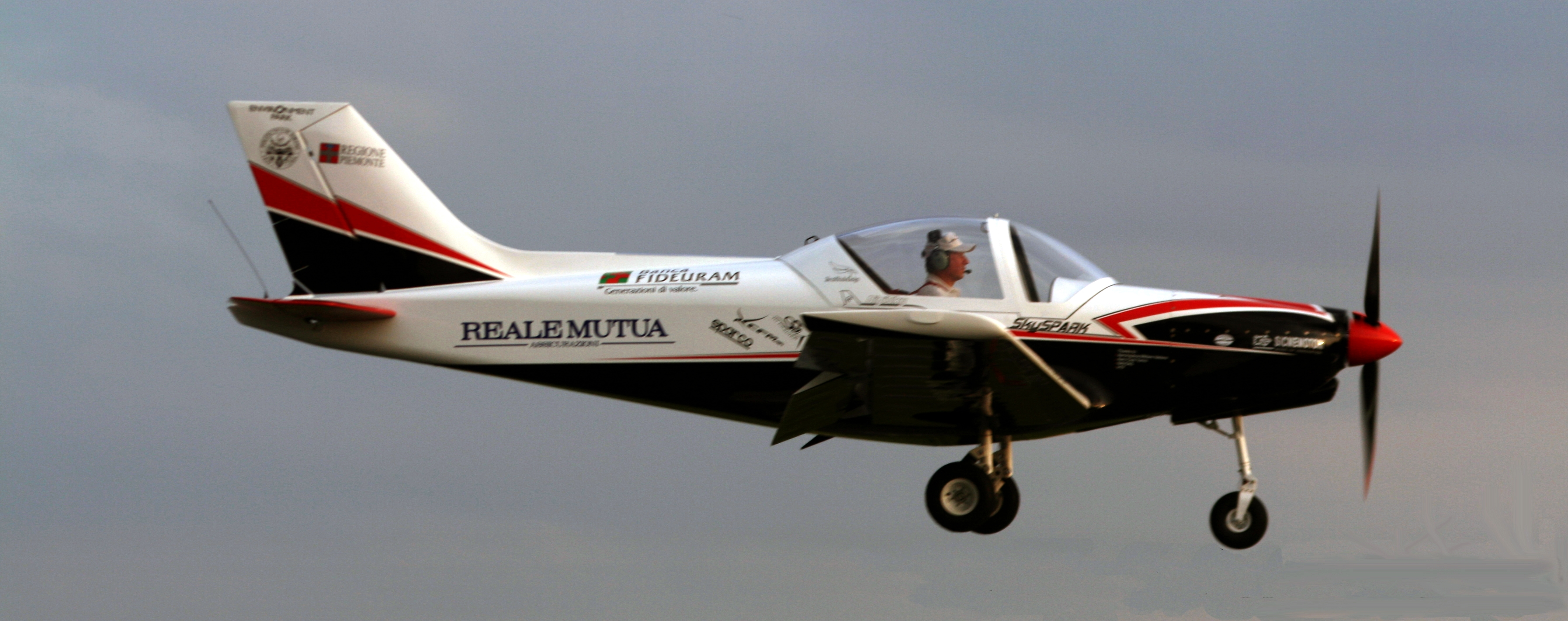 SkySpark foto in volo